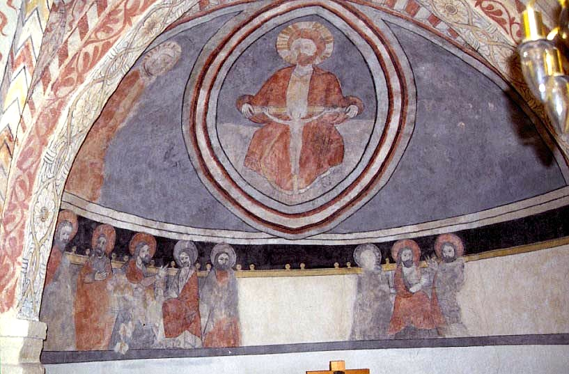 Östra Hoby kyrka i Skåne, Sverige. Apsis, Majestas og apostelrække